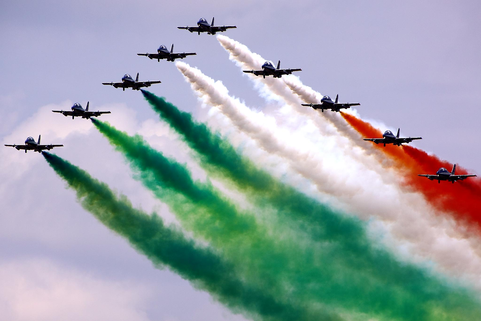 Frecce Tricolori - RIAT 2011